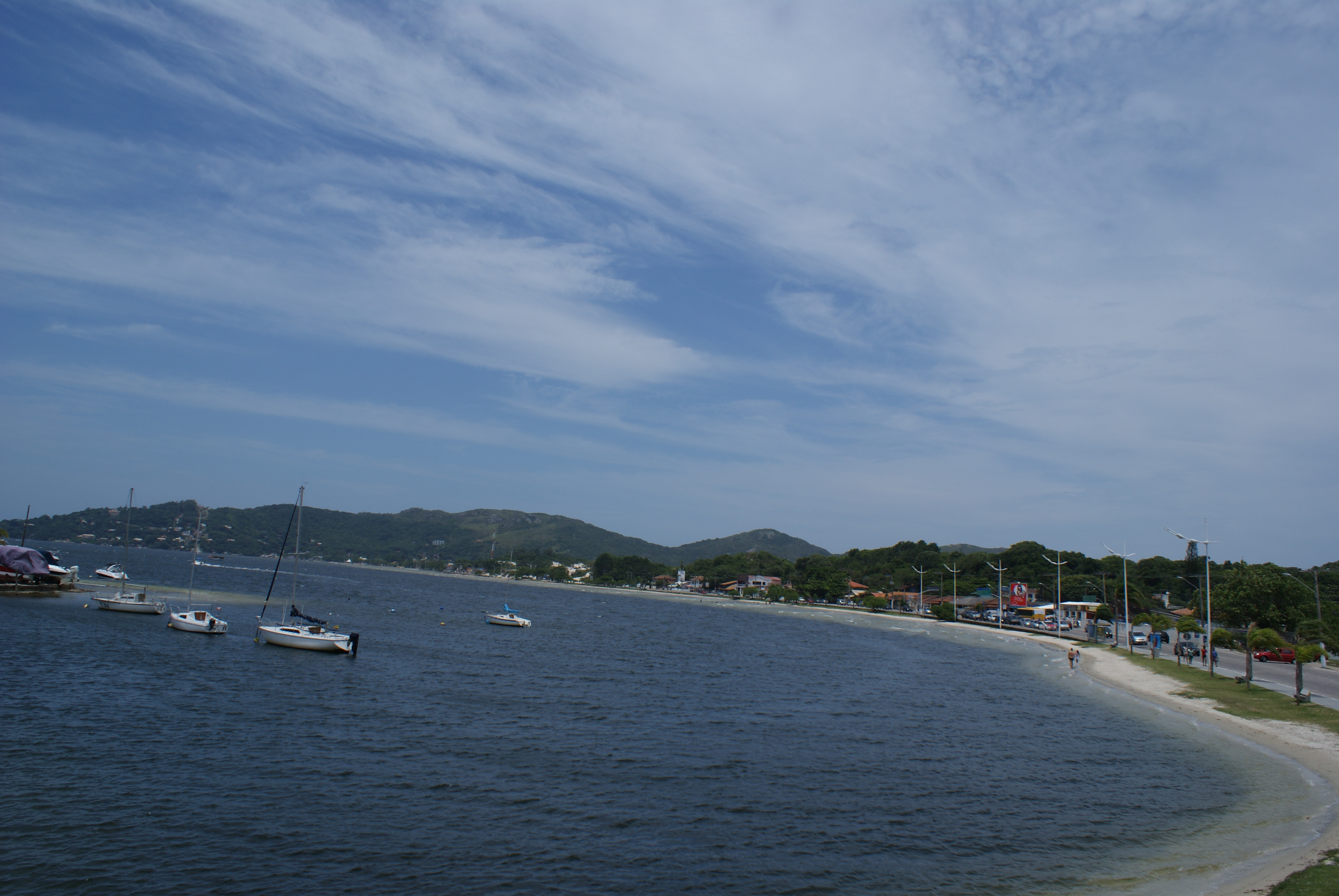 Orla da Avenida das Rendeiras, na Lagoa da Conceição, em Florianópolis, Brasil.